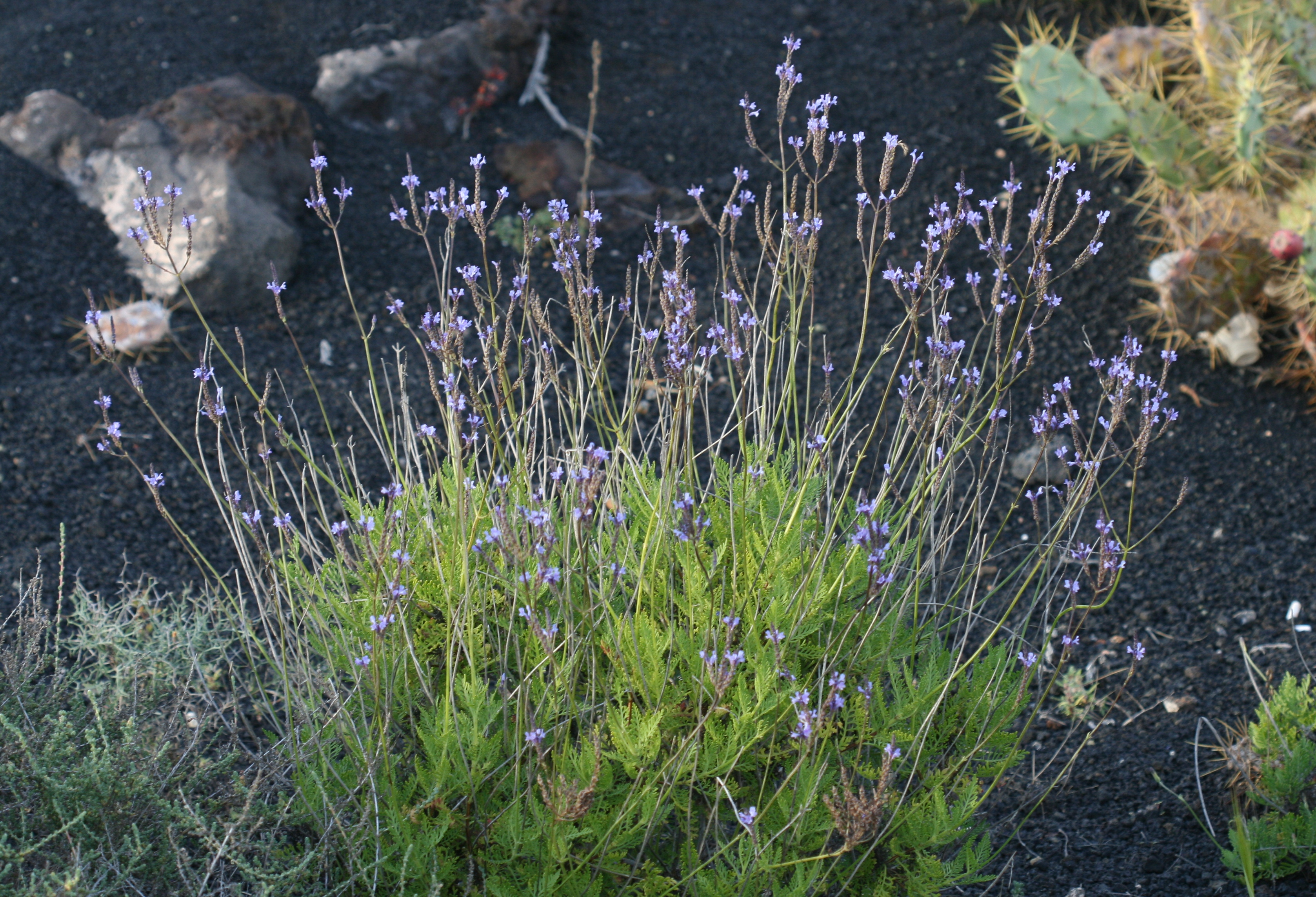 Playa Blanca, Lanzarote